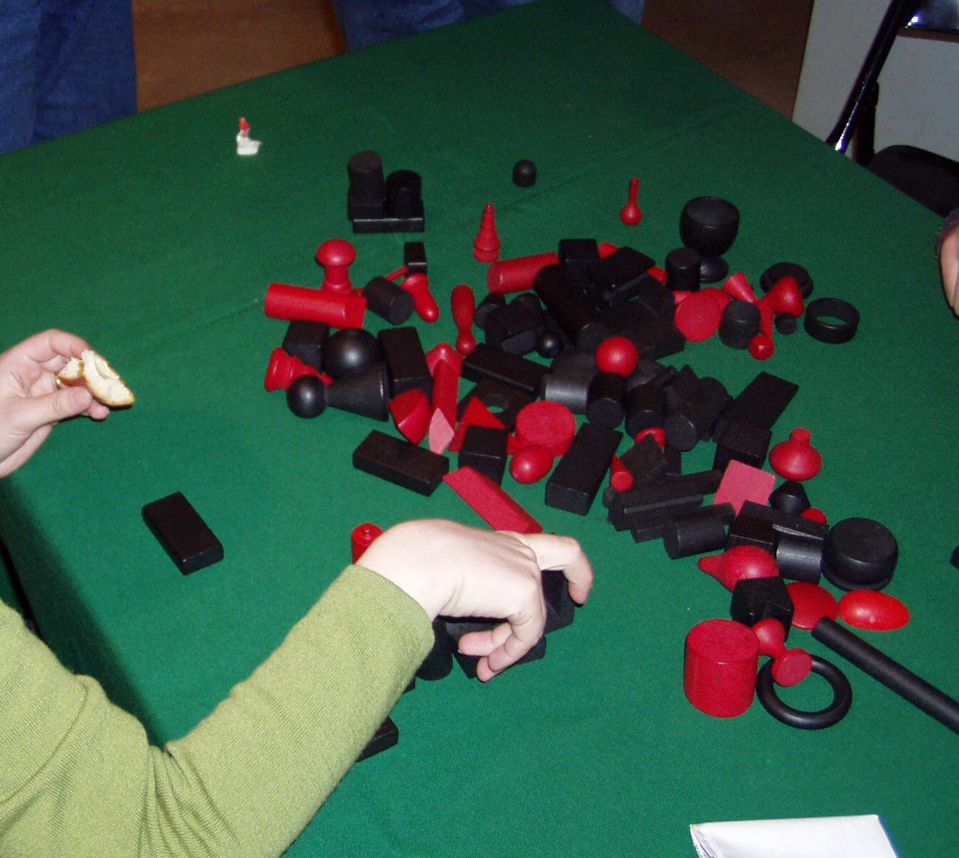 Sac noir, une autre version de Bausack (Zoch Spiele)